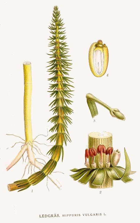 Original Description Ledgräs, Hippuris vulgaris L.